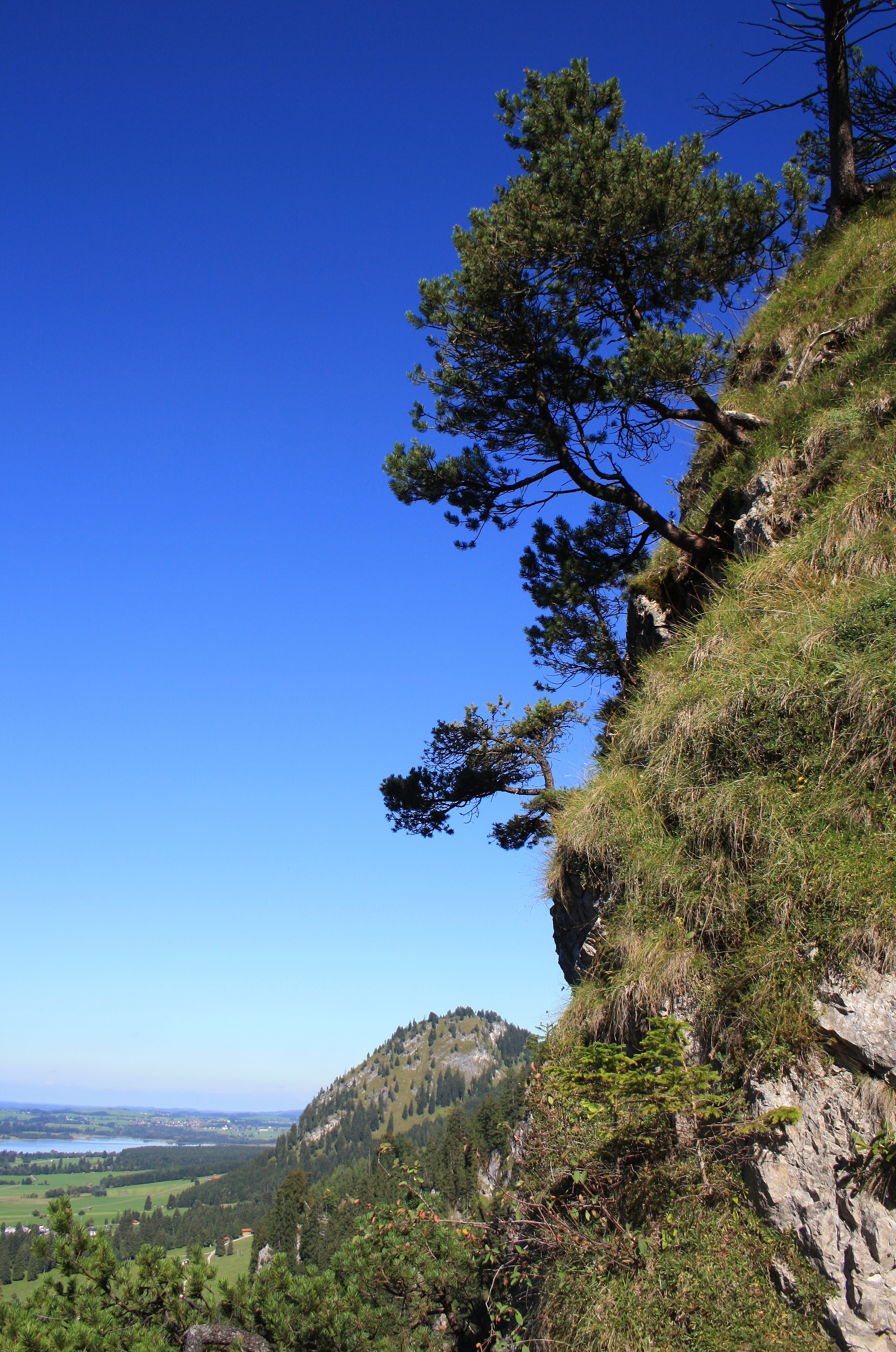 Felsen beim Schloss Neuschwanstein in Schwangau. Landschaftsschutzgebiet „Schutz von Landschaftsteilen im Bereich des Faulenbacher Tales, des Lechtales, des Schwanseetales und des Alpseegebietes im Landkreis Füssen“ (LSG-00078.01).